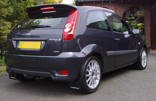 2007 Fiesta Zetec S Rear